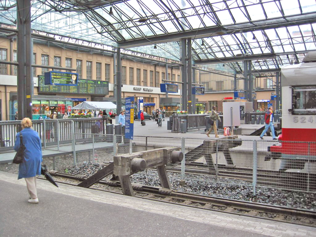 "Sujet:Kappgare Helsinki Source:Fotograf:de:Benutzer:Andre Riemann